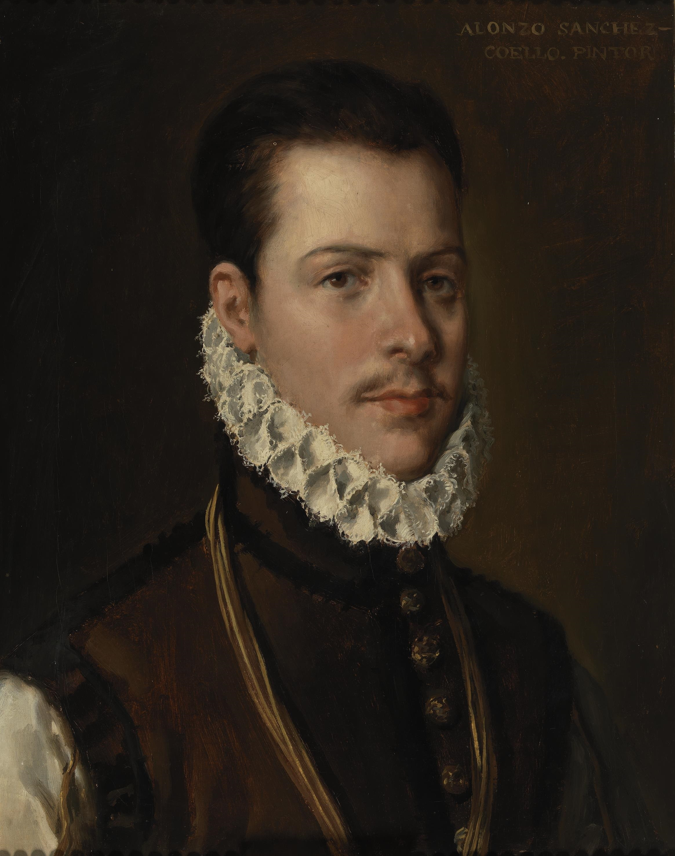 Retrato del aristócrata español Fernando de Gurrea y Aragón (1546-1592), que fue duque de Villahermosa y conde de Ribagorza. Esta obra es una copia decimonónica del retrato del duque conservado actualmente en el Museo de Bellas Artes de Valencia y ejecutada por el pintor Roland des Mois.